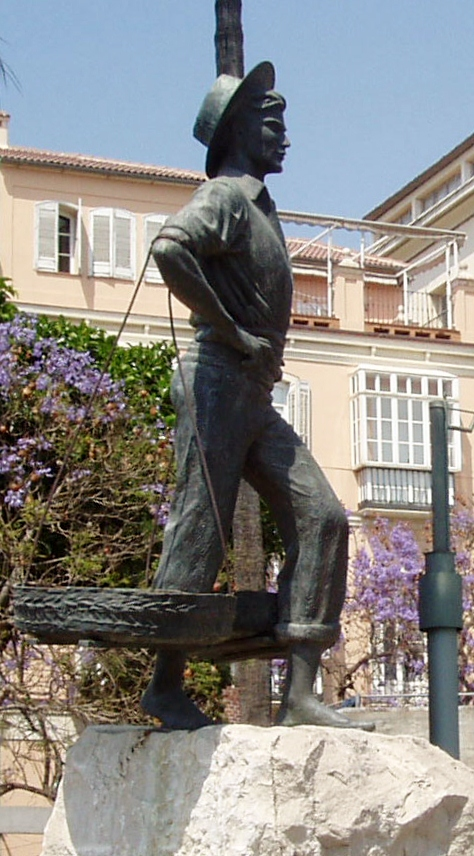 Estatua al cenachero en Málaga, España.